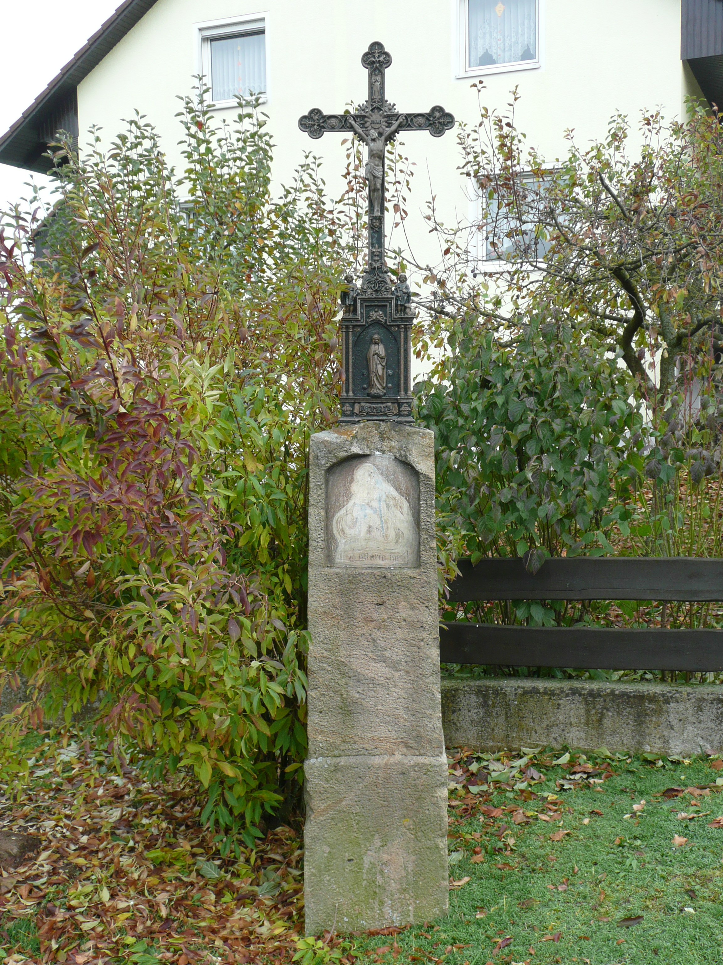 Gänshutmarterl Gemarkung Massenricht, Hirschau, Bayern